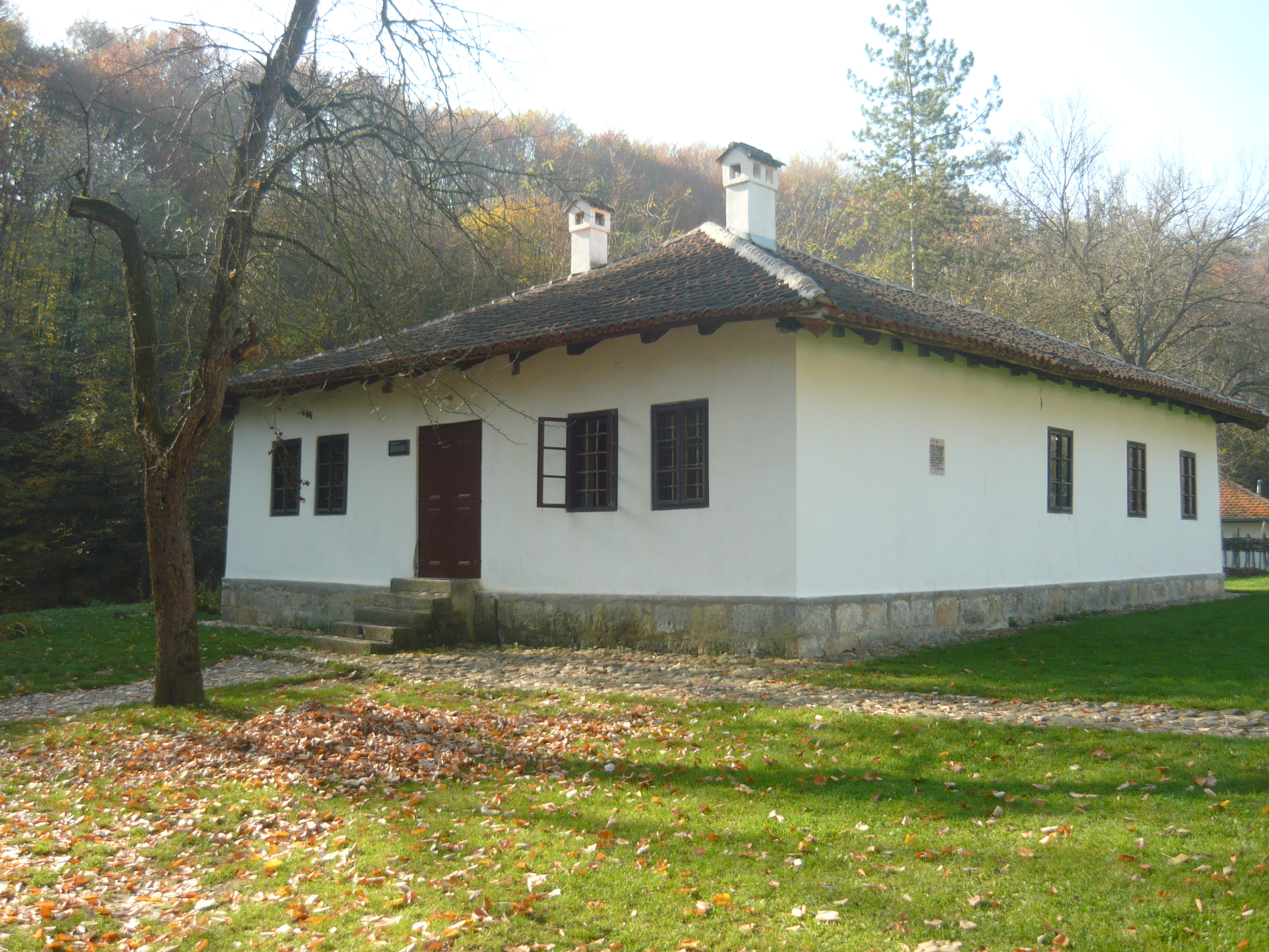 Школа из прве половине 19. века